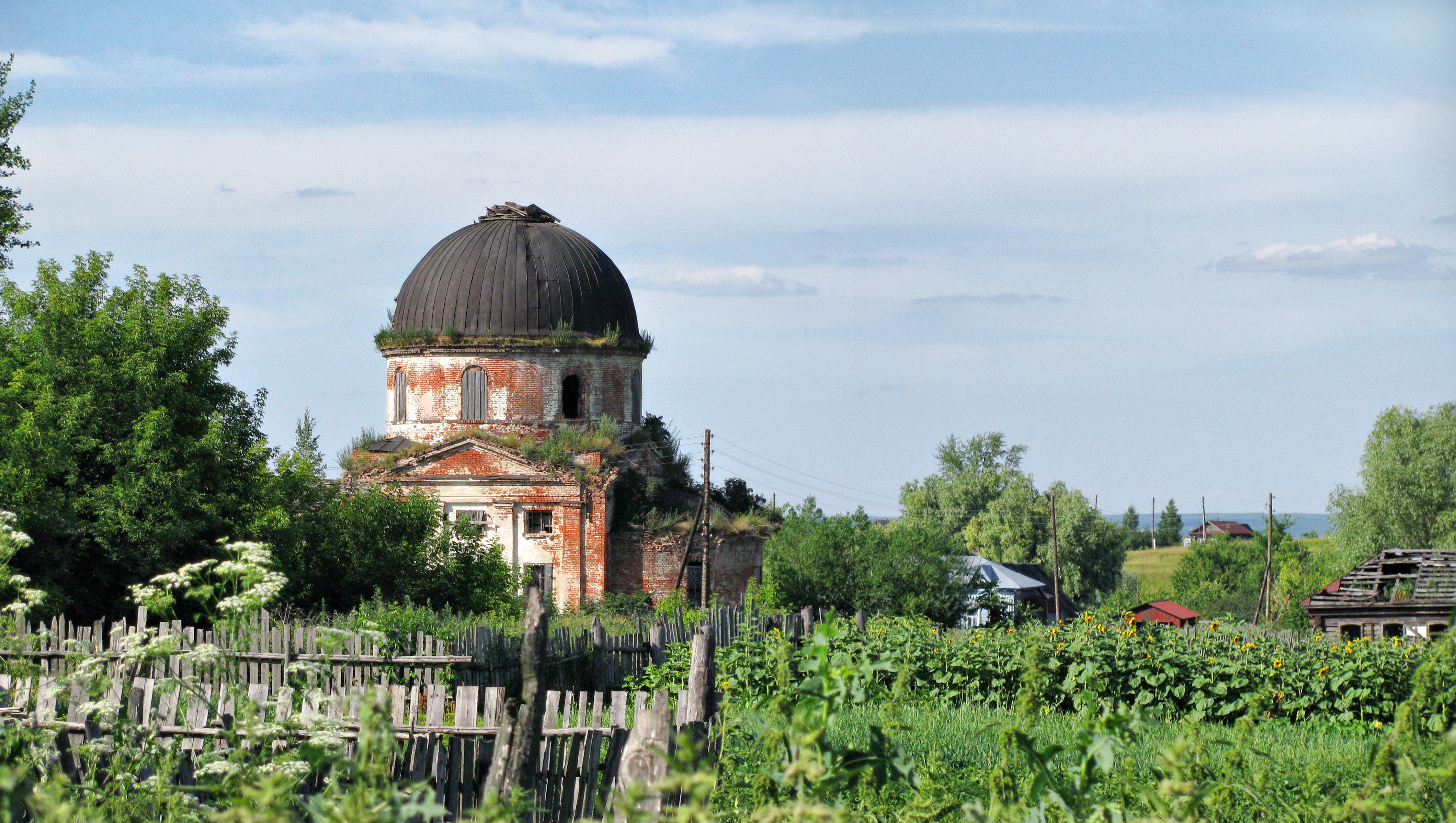 Церковь Ленинское Арзамасский район